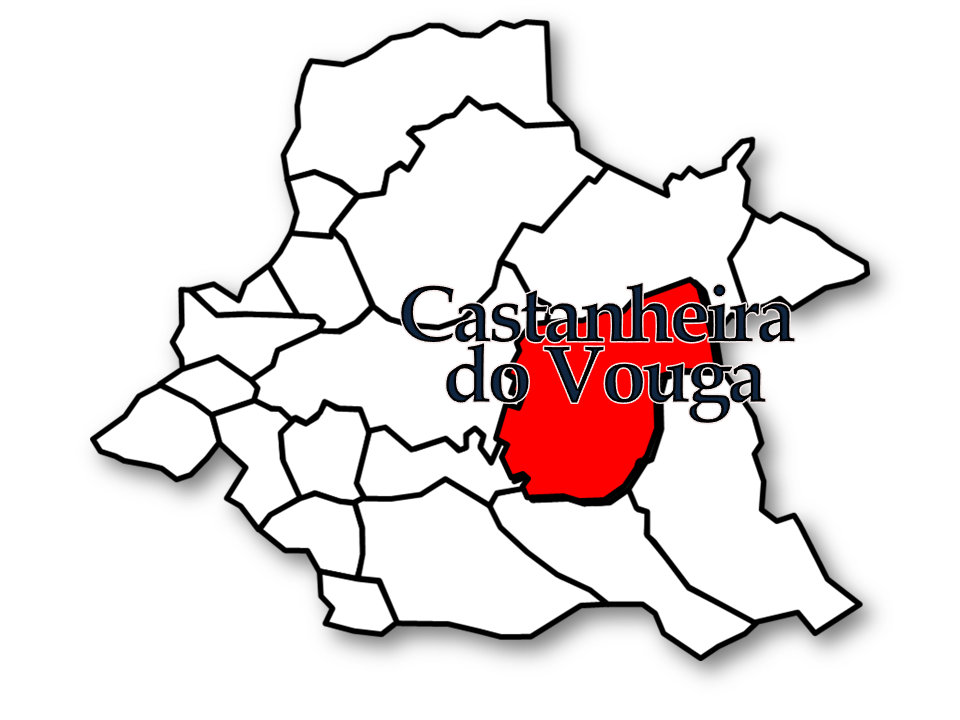 Censos 1864/2011